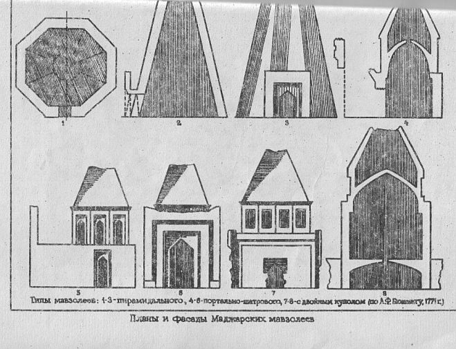 Планы и фасады маджарских мавзолеев (репродукция рисунка)